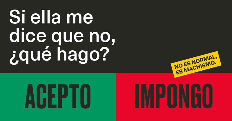 La campaña del área de Políticas de Género y Diversidad ‘No es normal, es machismo’ es la protagonista este domingo, 25 de noviembre, en las pantallas digitales de la ciudad dentro del bucle de reserva institucional: mupis digitales, marquesinas digitales, pantallas en Callao. La campaña está dirigida a los hombres, con el objetivo de que cambien sus actitudes machistas, que están en la base de la violencia de género. En los soportes podrán leerse, sobre fondo negro, las siguientes frases: ‘Si ella me dice que no, ¿qué hago?’, ‘En mi relación de pareja, ¿cómo soy?’, ‘Ante una broma machista, ¿cómo soy?’ o ‘Frente a la violencia machista, ¿qué hago?’ Son preguntas sencillas pero con carga de profundidad, porque obligan a cuestionarse conductas cotidianas.